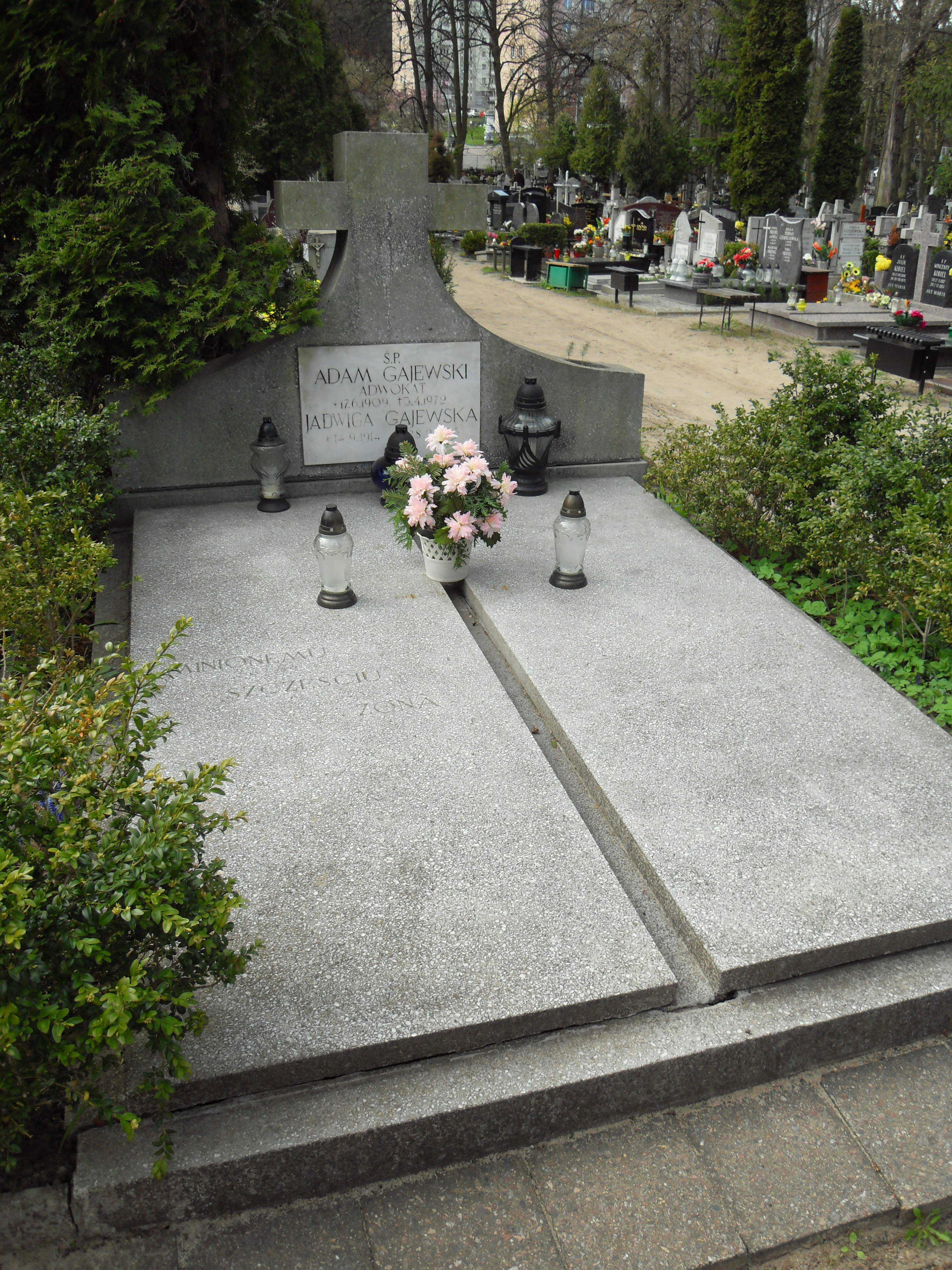 Gdańsk Oliwa. Cmentarz Oliwski, grób sędziego Adama Gajewskiego (1909-1972).